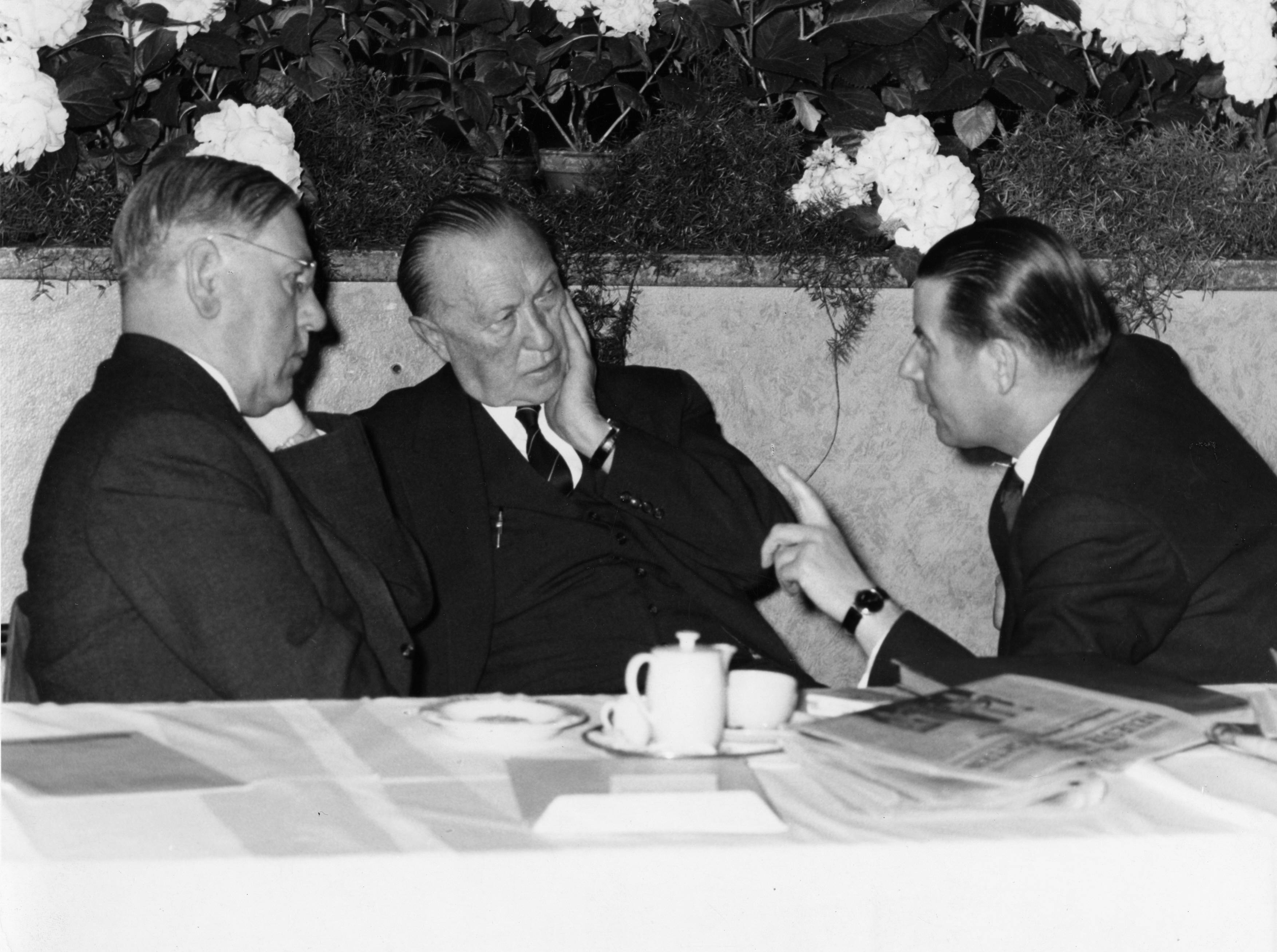 Adenauer, Konrad9. CDU-Bundesparteitag, 26.04.1960 - 29.04.1960